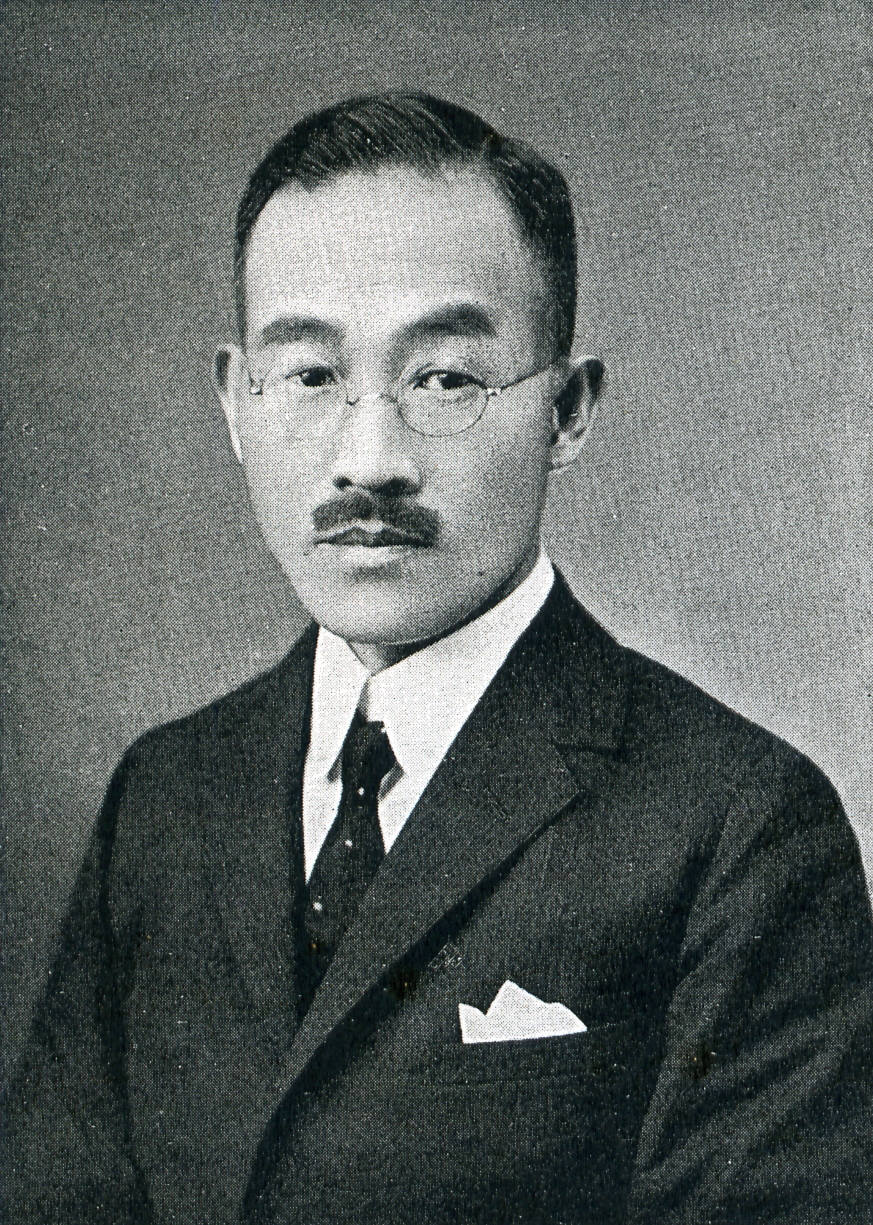 この写真は、喜多孝治（1878-1934）の写真です。